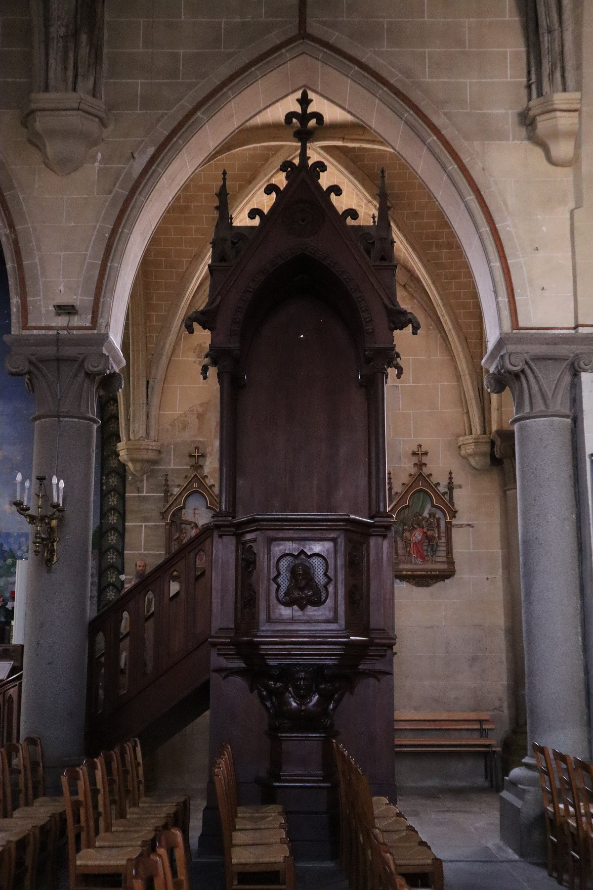 Chaire de l'église Saint-Pierre et Saint-Paul de Baguer-Morvan (35).